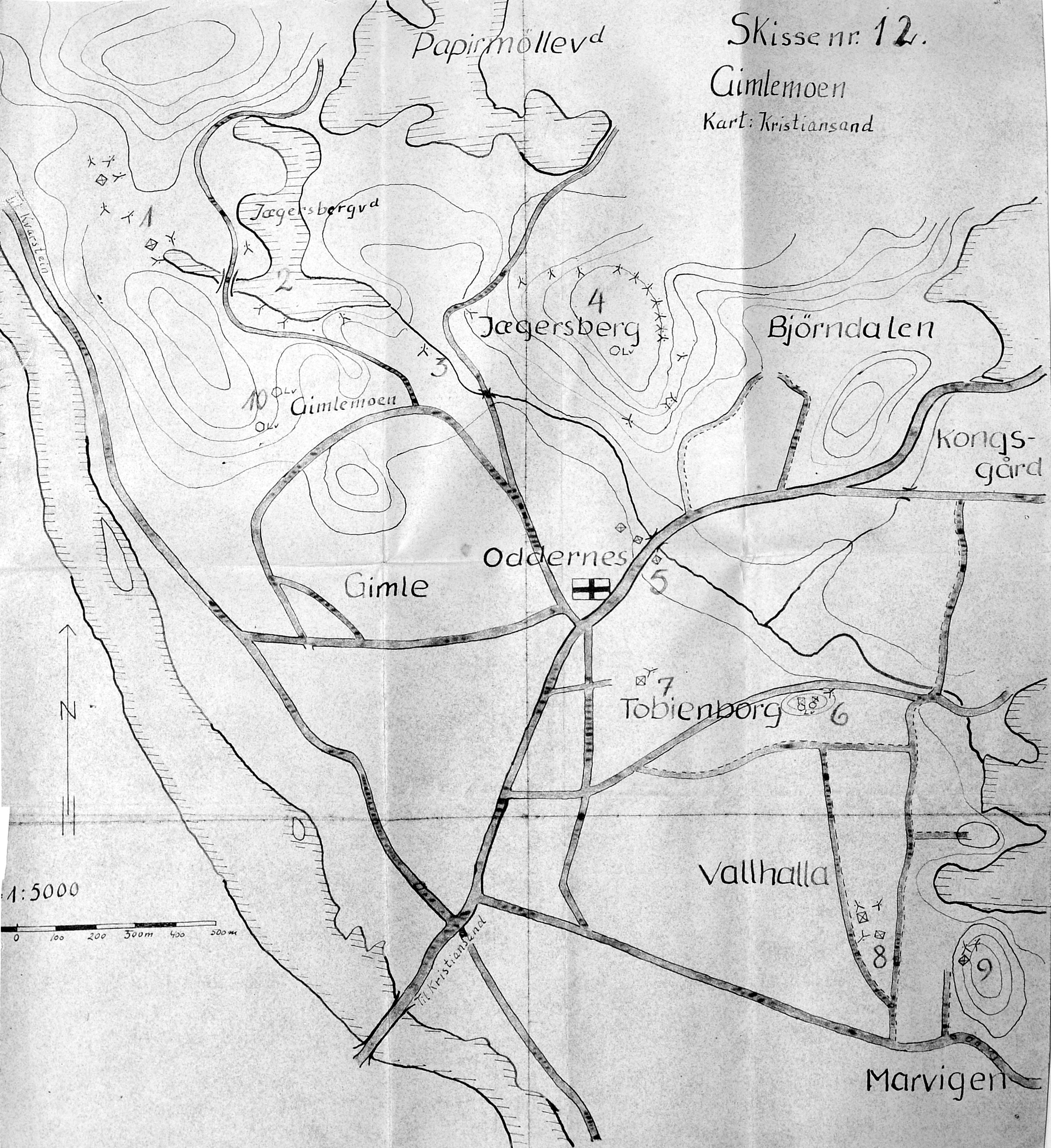 Kart over Gimlemoen, Kristiansand